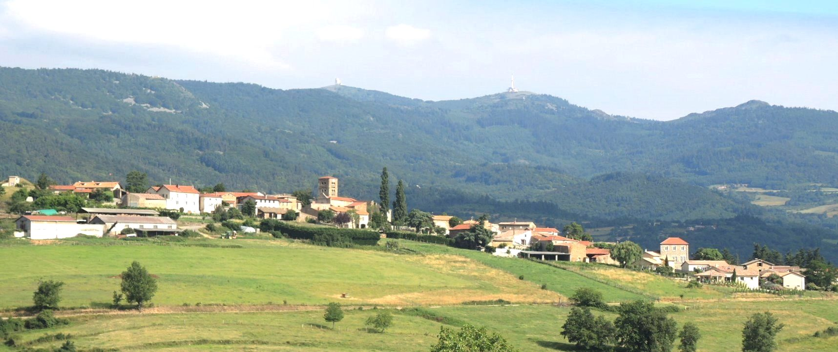 Saint-Jacques-d'Atticieux détail